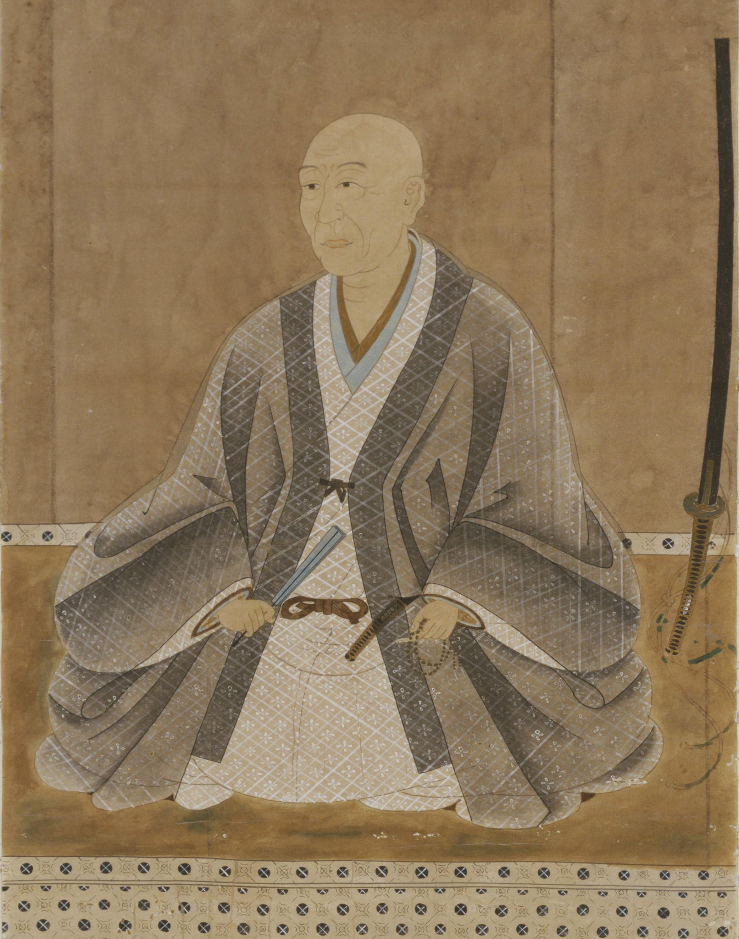 島津以久像（模写）。原本は京都市大雲院所蔵。